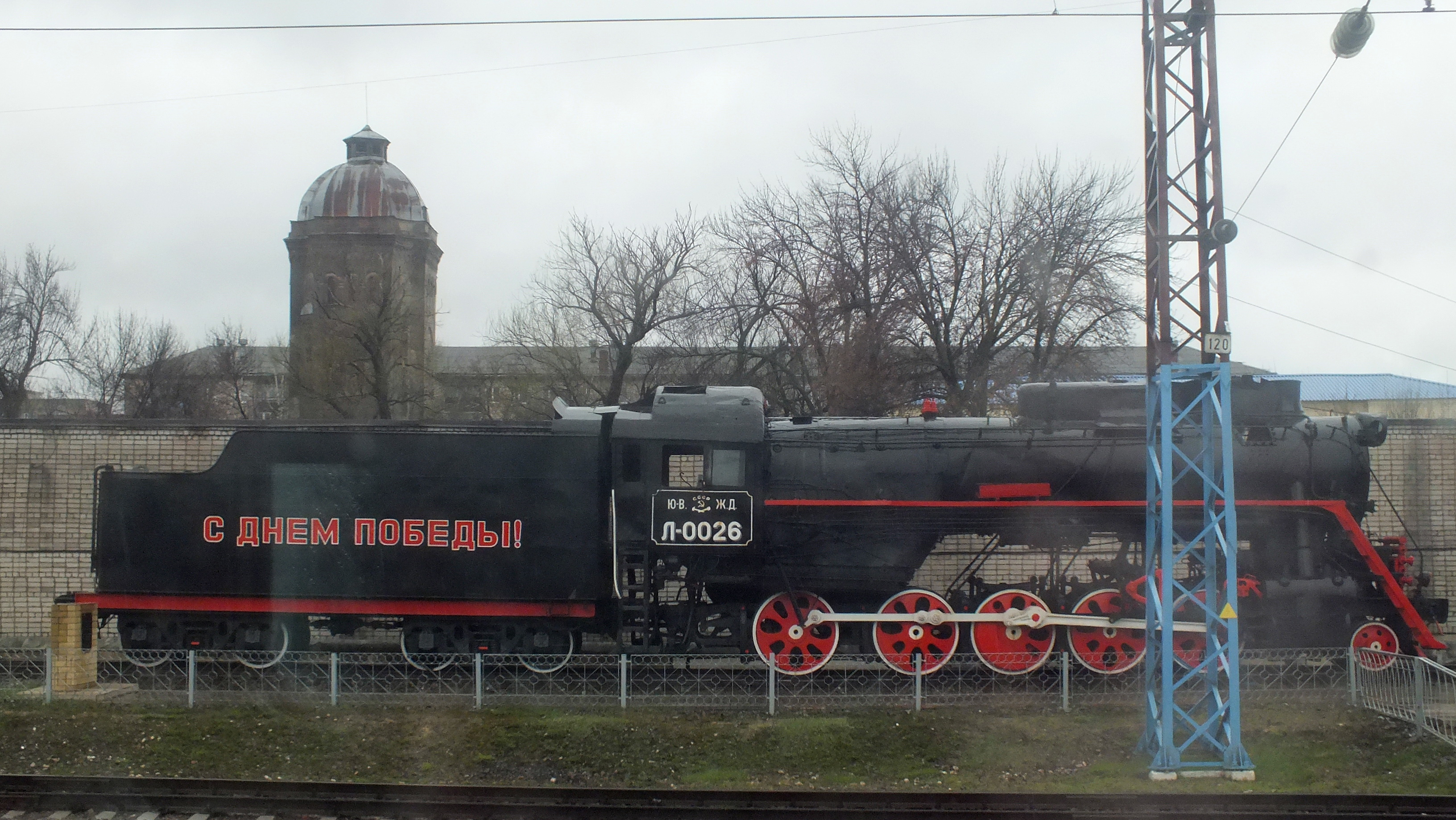 Паровоз-памятник Л-0026 на станции Ртищево-1 в Саратовской области. Построен Коломенским заводом в 1946 году. Памятник официально открыт 4 августа 2012 года. Время съёмки фотографии — саратовское (UTC+4).